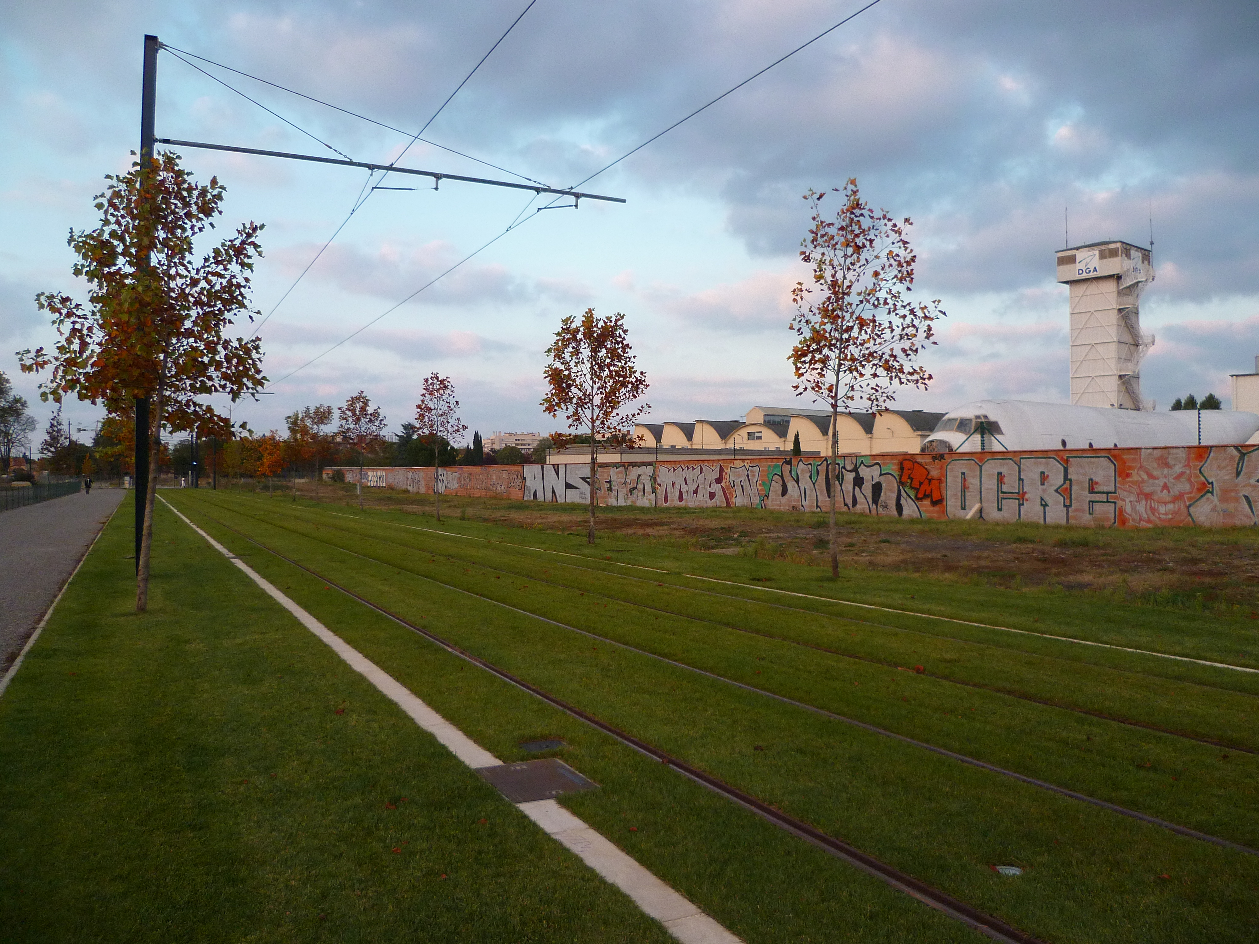 Le tram de Toulouse entre Zénith et Cartoucherie. Vue du site de la DGA.